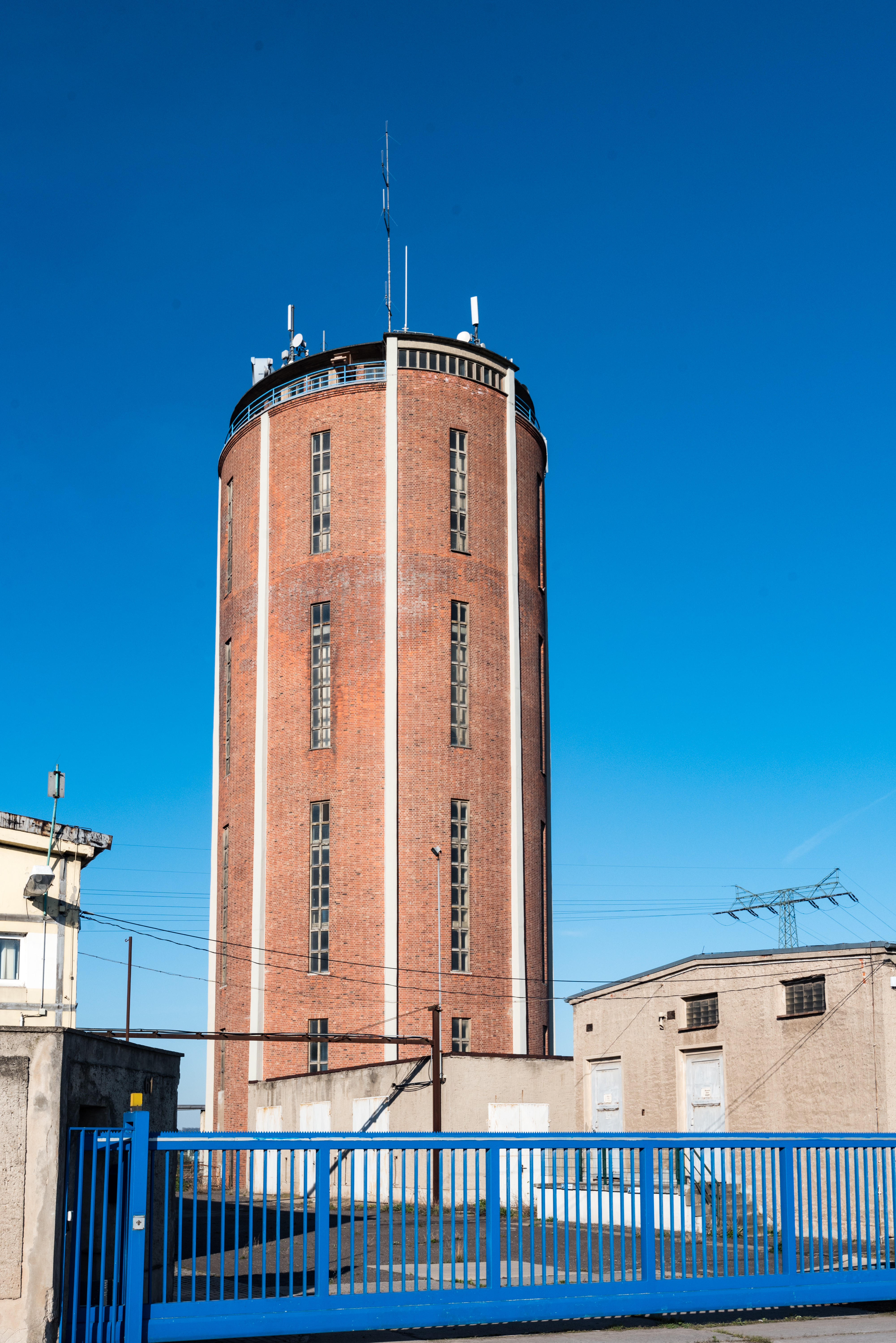 Staßfurt, Athenslebener Weg 35